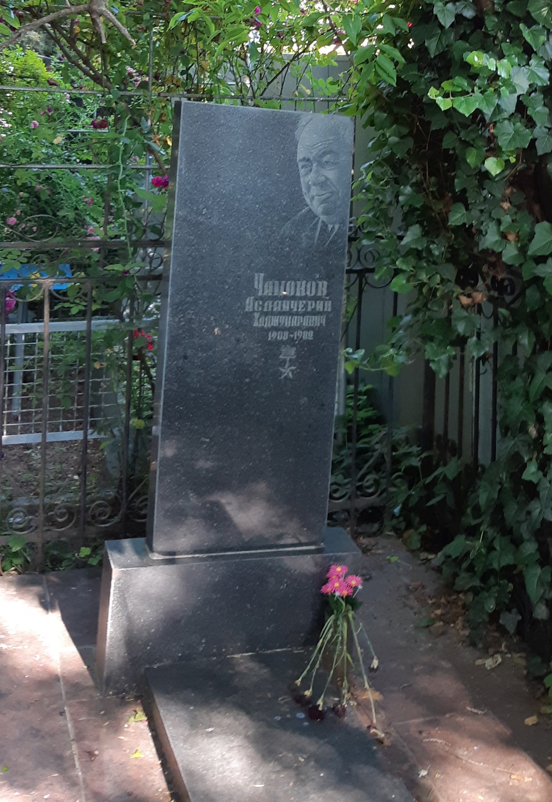 Памятник Чамокову А. Х.